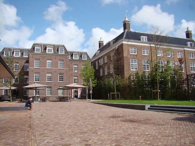 Childerens Hermitage Amsterdam, Kinder Hermitage Amsterdam.